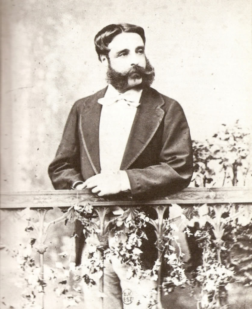 José Osorio y Silva, duque de Sesto y de Alburquerque, marqués de Alcañices y de Cuéllar.